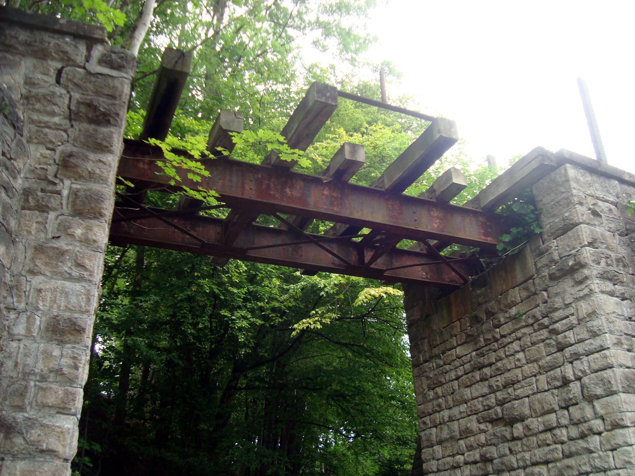 Die Brücke über die Bergstraße. Letzte Spuren der Schmalspurbahn in Eisfeld.